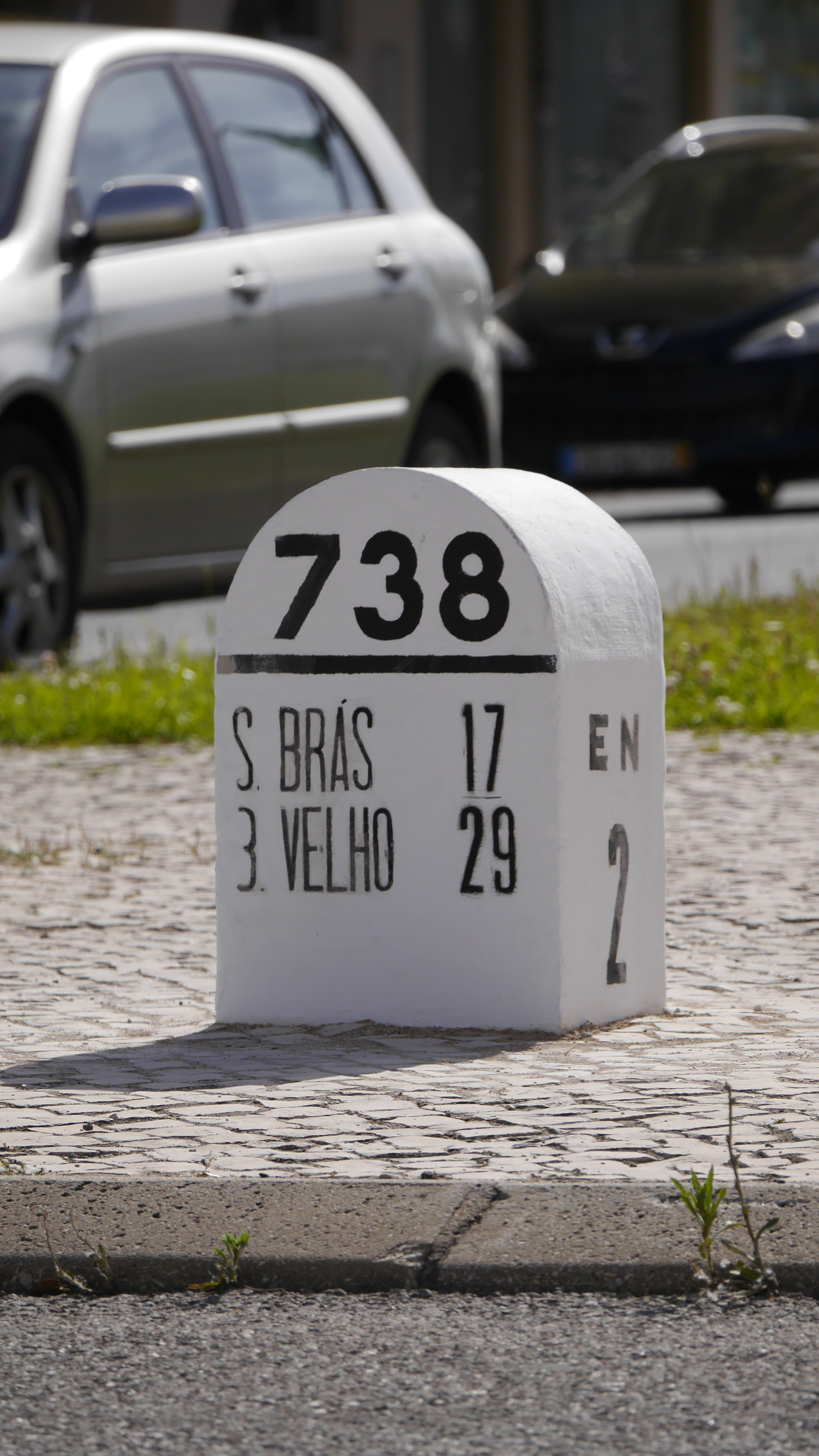 Marco original reposto pela Câmara de Faro a 20/05/2016